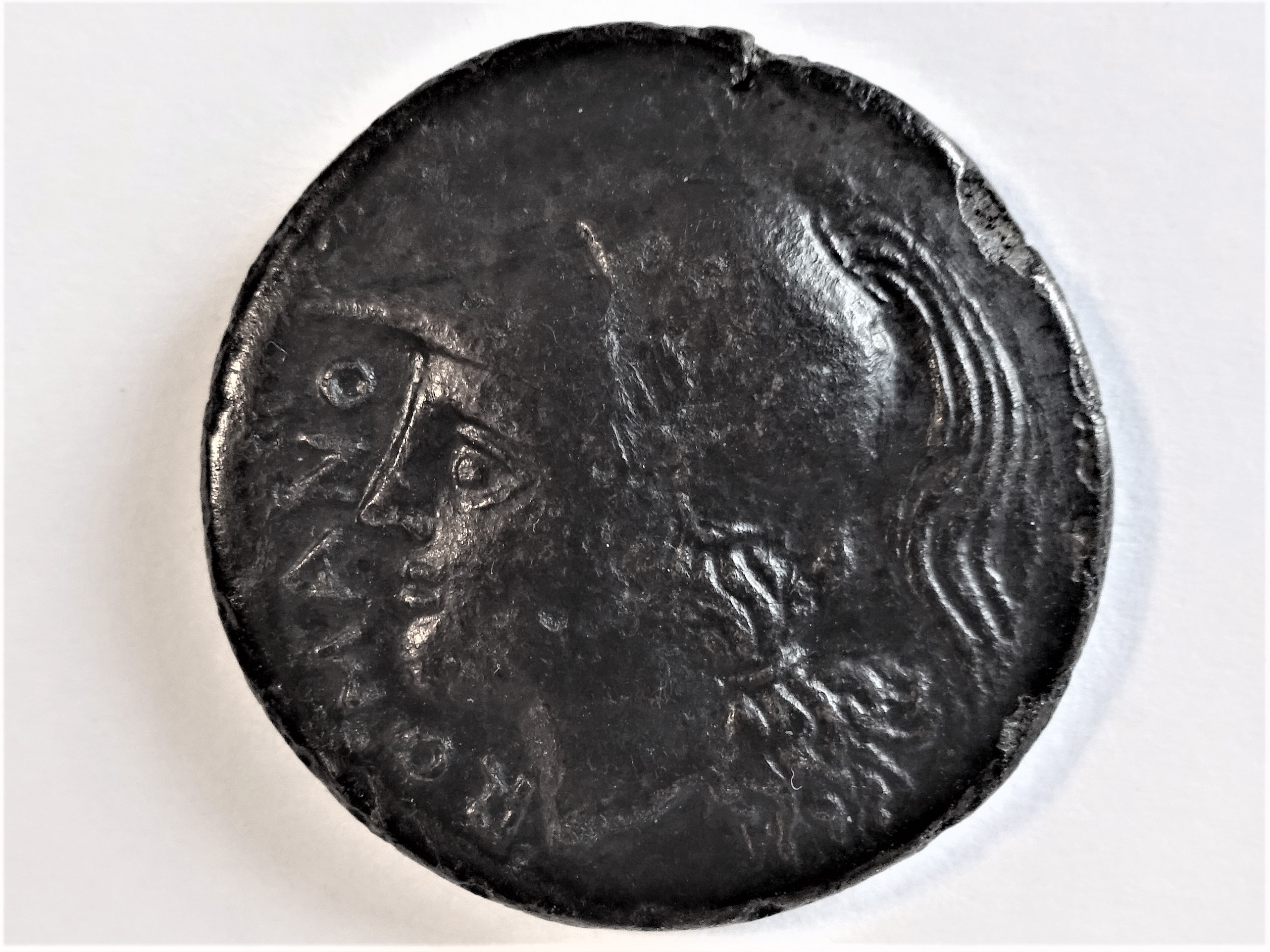 Bronzemünze der Römer für Messana, Minervakopf, 264 v. Chr gepägt, ROMANO, Albert Nr. 46/Crawford 23/1